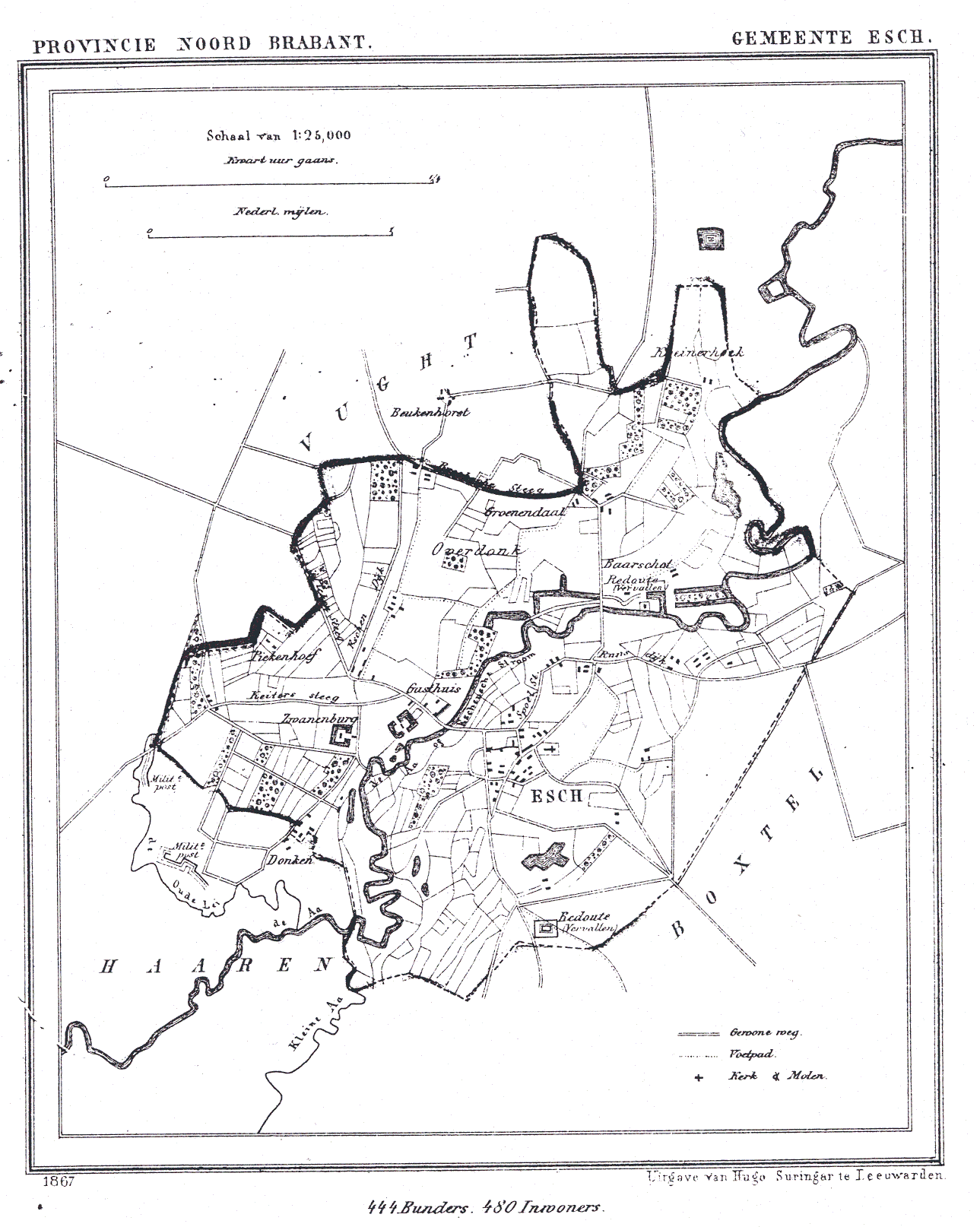 Nederland, Noord-Brabant, Gemeente Esch